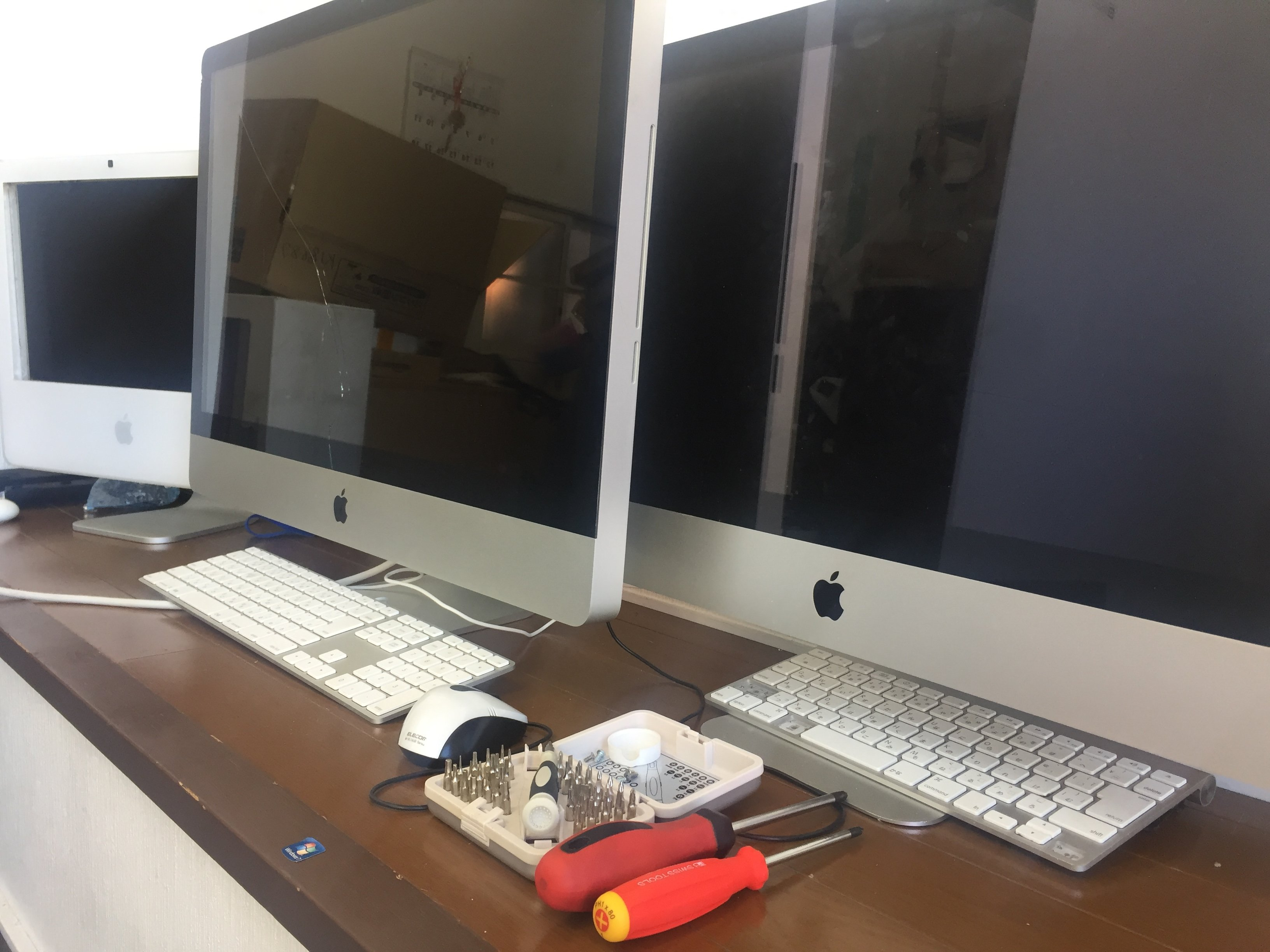 Apple社製マッキントッシュの修理を承ります。